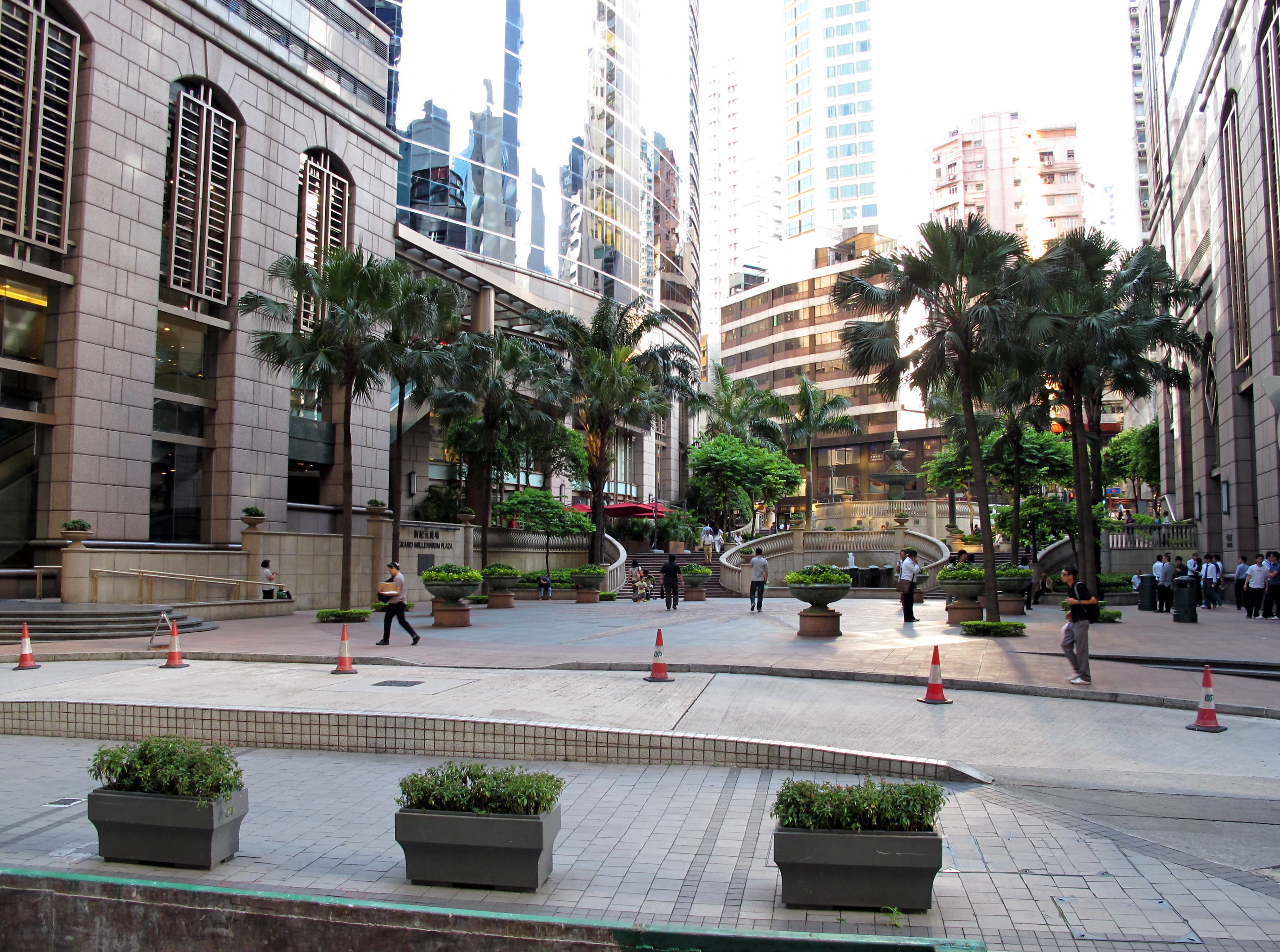 Millennium Plaza Open Space, Sheung Wan